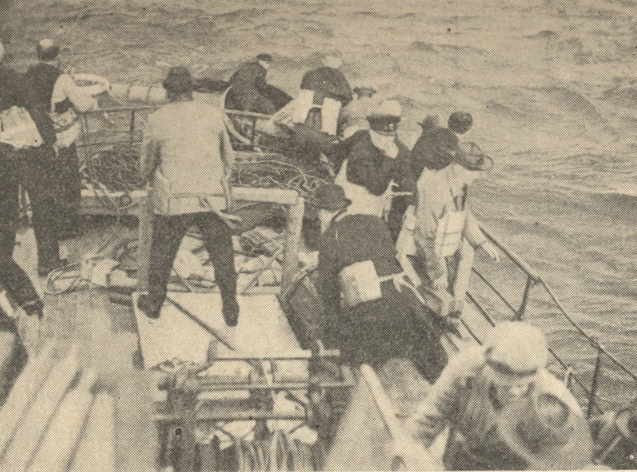 Description